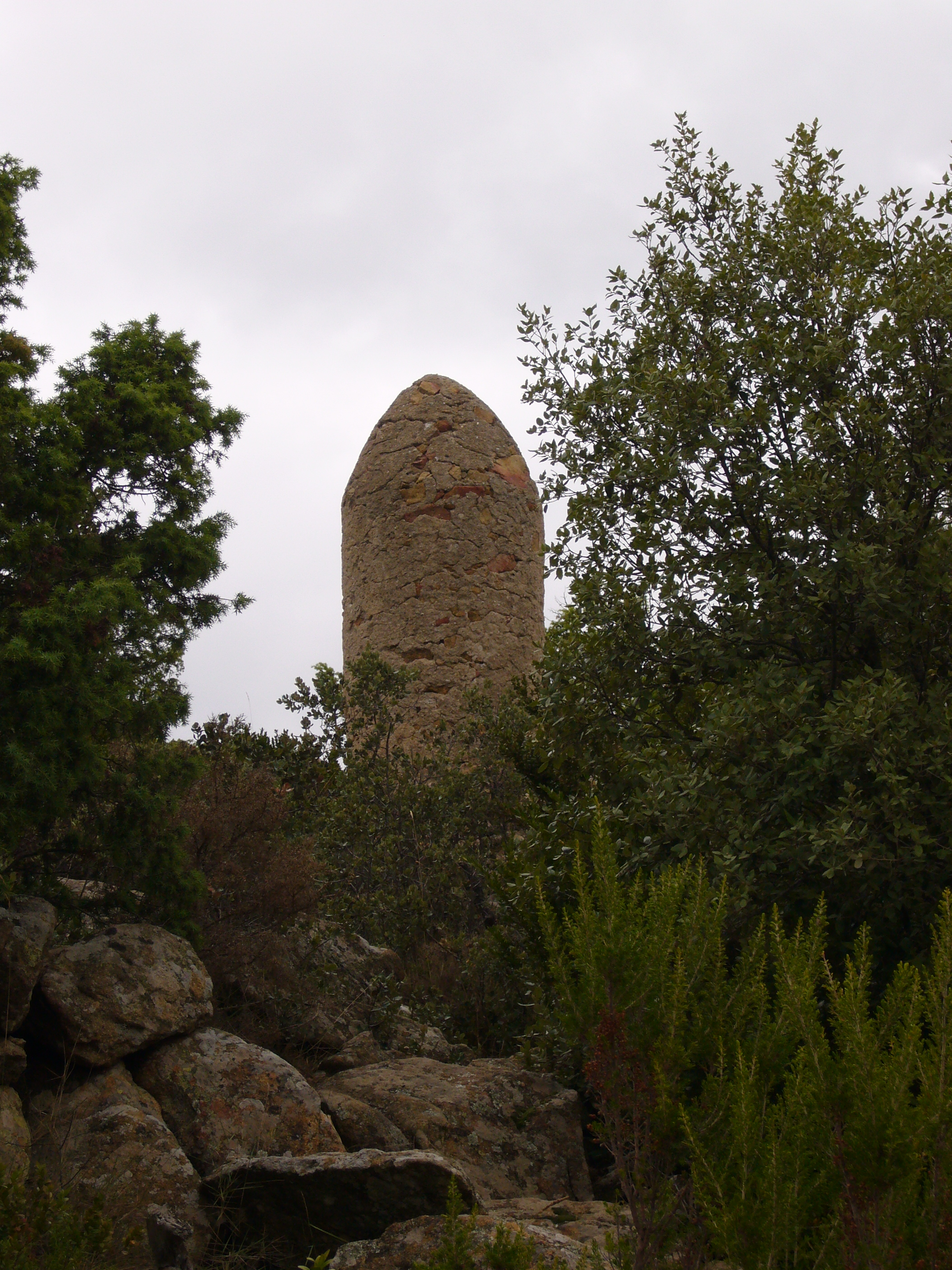 Bélesta (Pyrénées-Orientales, France) : Borne frontière qui marquait autrefois la limite sud du royaume de France.